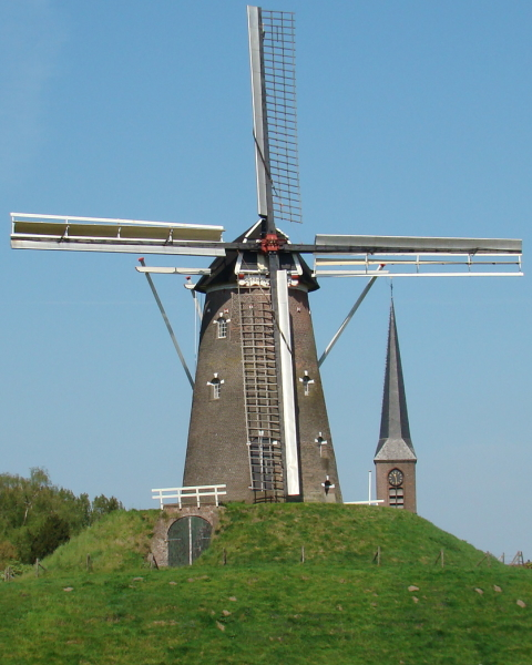 Molen Prins van Oranje, Bredevoort